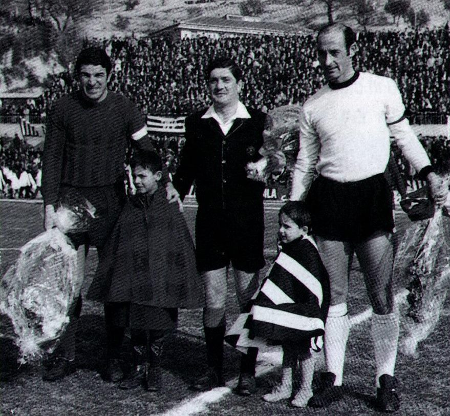 Ascoli Piceno, Stadio Cino e Lillo Del Duca, 3 marzo 1968. Il capitano sambenedettese Paolo Beni (a sinistra) e quello ascolano Carlo Mazzone (a destra) prima del fischio d'inizio del derby marchigiano tra e (1-0) valevole per la 24ª giornata del campionato italiano di Serie C 1967-1968, girone B. Licensing 1968 03 03 1968 03 03 Beni, Paolo